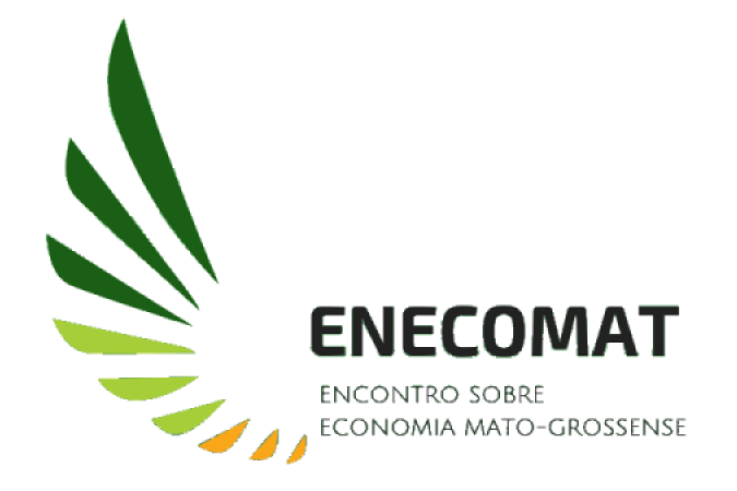 Logomarca do evento ENECOMAT